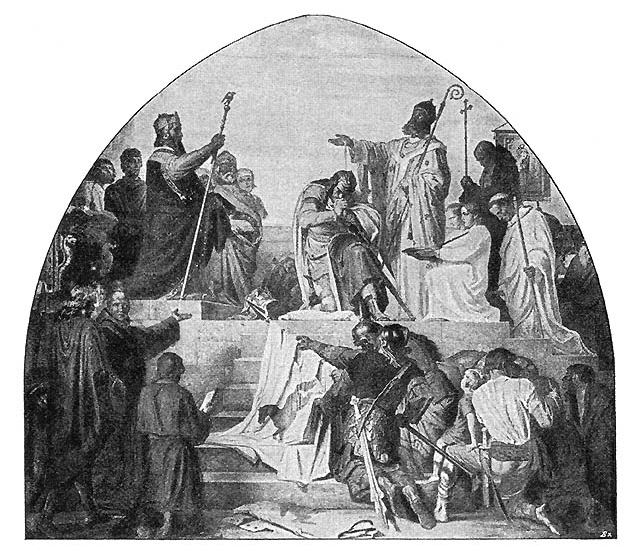 785: Die Taufe des Sachsenherzogs Widukind. Reproduktion eines nicht näher bezeichneten Lünettenbildes aus späterer Zeit. Buch-Scan von Wolpertinger - Lizenz: Public Domain (Leistungsschutzrechte abgelaufen.) Nachträgliche Anmerkung: eines nicht näher bezeichneten Lünettenbildes aus späterer Zeit?? Von wegen "Lünettenbild": es handelt sich um: Die Taufe Wittekinds (Widukinds), Fresko nach dem Entwurf von Alred Rethel (1816-1859), ausgeführt von dessen Schüler Josef Kehren (1817-1880) als Bestandteil des Zyklus der monumentalen Karlsfresken im Aachener Rathaus (im Zweiten Weltkrieg zerstört, anlässlich der Ausstellung Krönungen. Könige in Aachen - Geschichte und Mythos im Jahr 2000 von Agfa in Originalgröße fototechnisch rekonstruiert) Weiterführend - auch zum Widukind- bzw. Karlsmythos des 19. Jh.: Annette Fusenig: Denn diese Malerei bedarf des geweihten Auges.... die Karlsfresken im Aachener Rathhaus. In: Mario Kramp (Hg): Krönungen. Könige in Aachen - Geschichte und Mythos, Kat. Ausstellung Aachen, Mainz 2000, Bd. 2, S. 751-764 Hartmut Hilden: Mit digitaler Fototechnik stellt Agfa drei Karlsfresken des Aachener Krönungssaales wieder her In: ebda, S. 883-885 Annette Fusenig: Karl der Große in historischer und symbolischer Auffassung. Alfred Rethel in Frankfurt und die Karlsfresken im Aachener Rathaus. In: August Heuser und Matthias Th. Kloft (Hg.): Karlsverehrung in Frankfurt am Main. Eine Ausstellung des Dommuseums Frankfurt und des Historischen Museums Frankfurt. Frankfurt am Main 2000, S. 74-86 (hier S. 81-82). gez. Mario Kramp Weitere Anmerkung: Vergleiche abgebildetes Banner des Widukind mit der Flagge des Kreis Herford